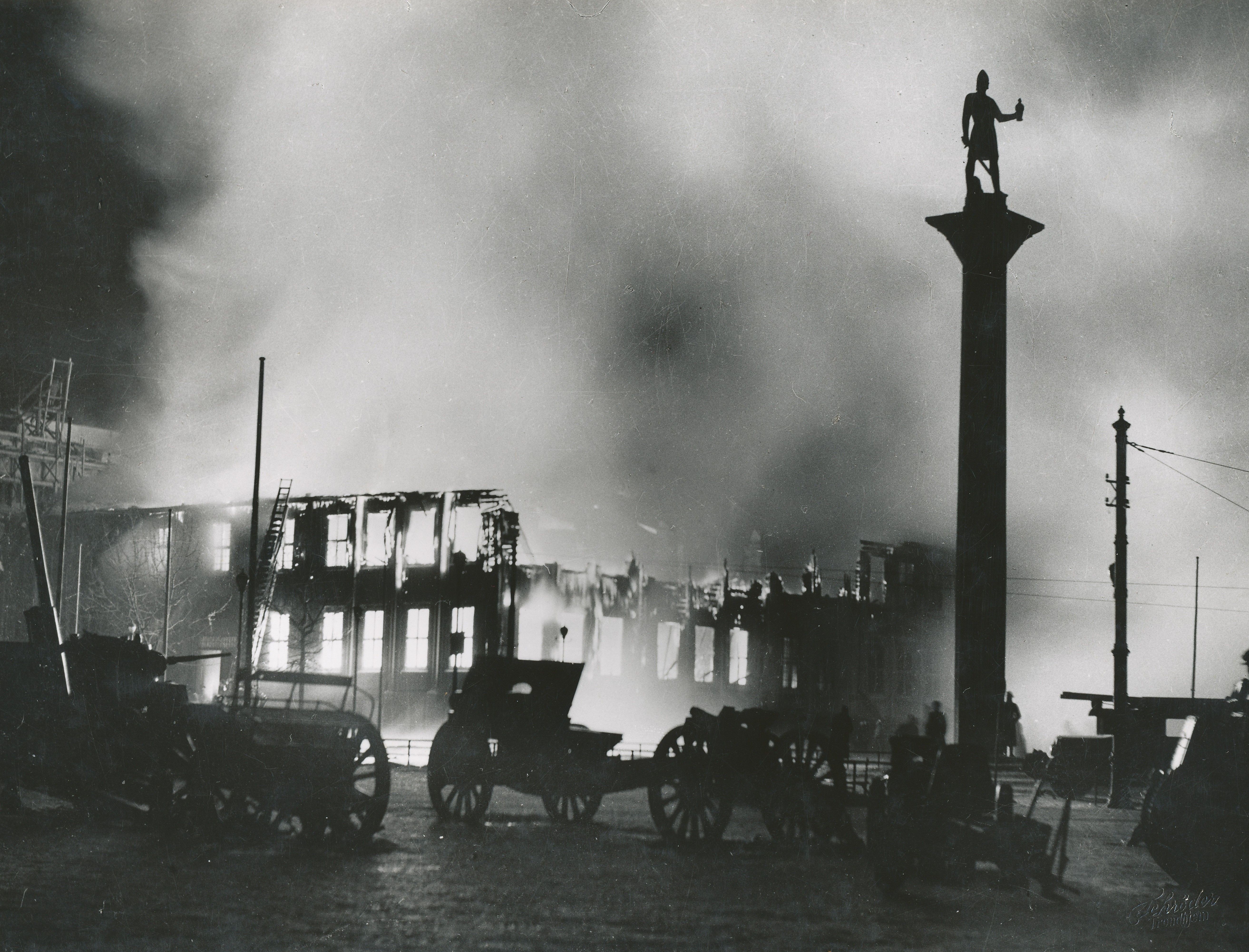 Brann i Harmonien (1942). Ukjent fotograf. Fra Trondheim Brannsvesens arkiv.